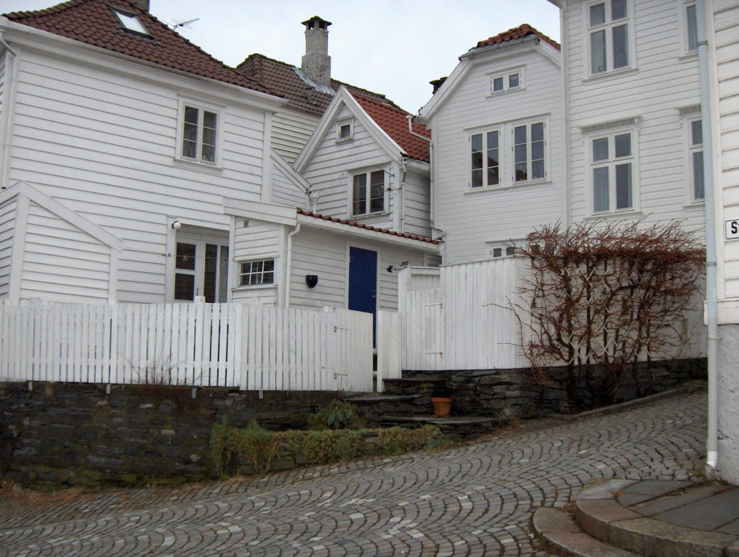 Strangeplassen dans le quartier de Nøstet à Bergen.